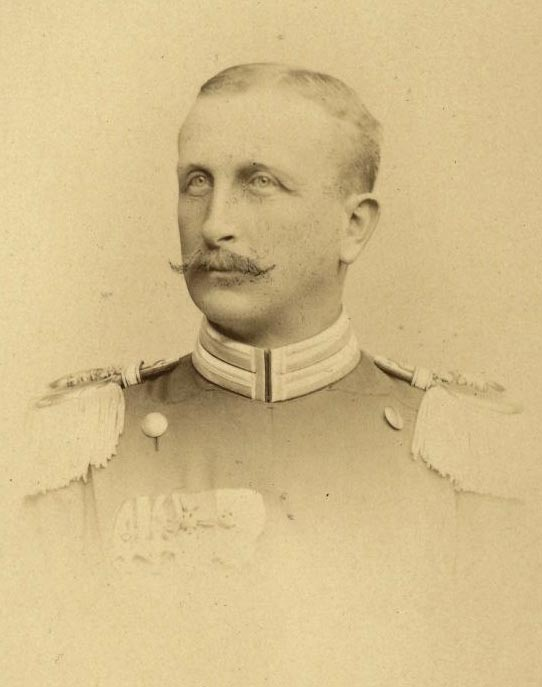 Hyppolyt (Hyppolith) von Gemmingen (1856–1924)